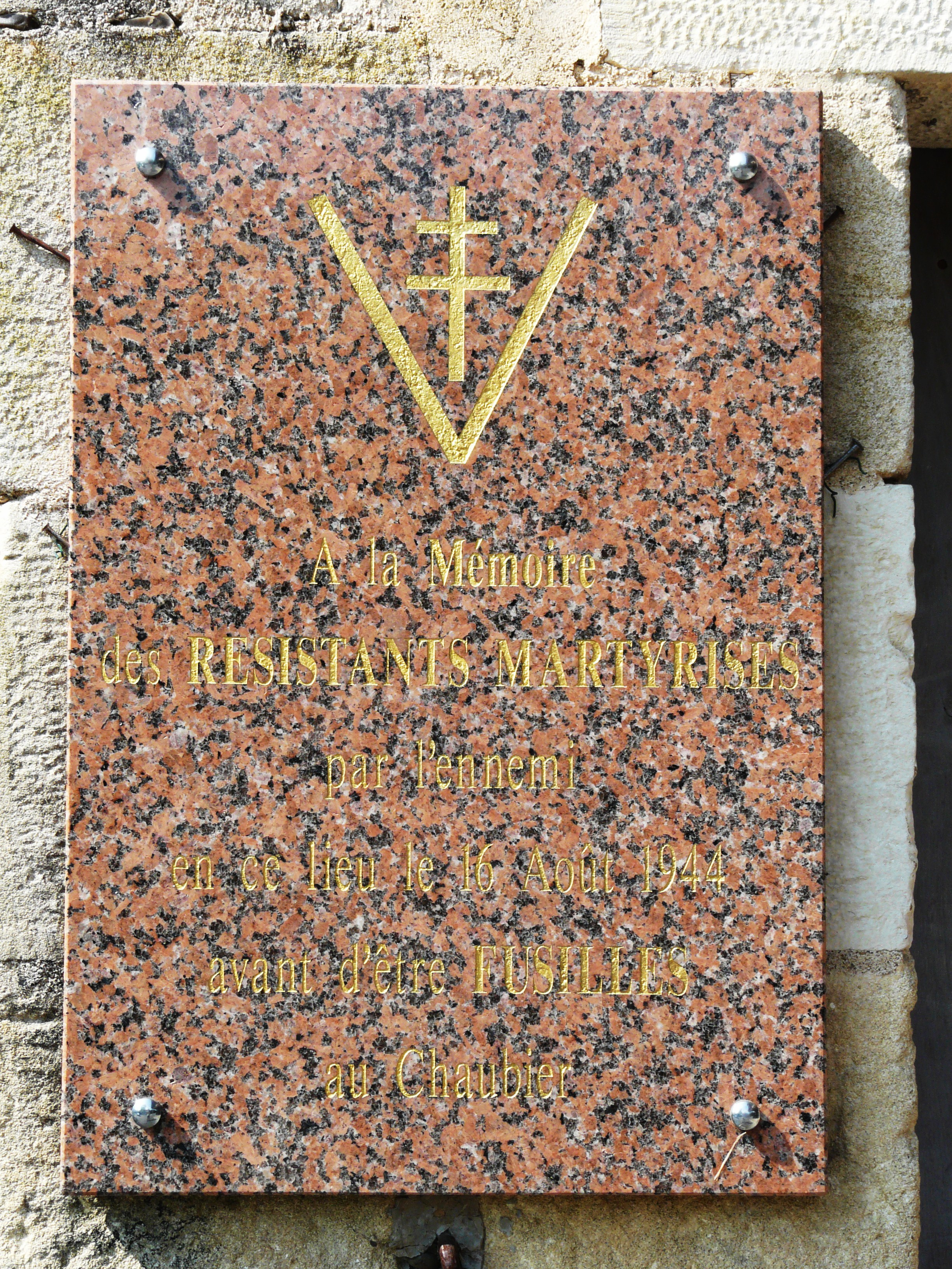 Plaque en mémoire des résistants martyrisés le 16 août 1944 au lieu-dit la Roquette, Eyliac, Dordogne, France. Les résistants ont ensuite été fusillés sur la même commune, au lieu-dit le Chaubier.